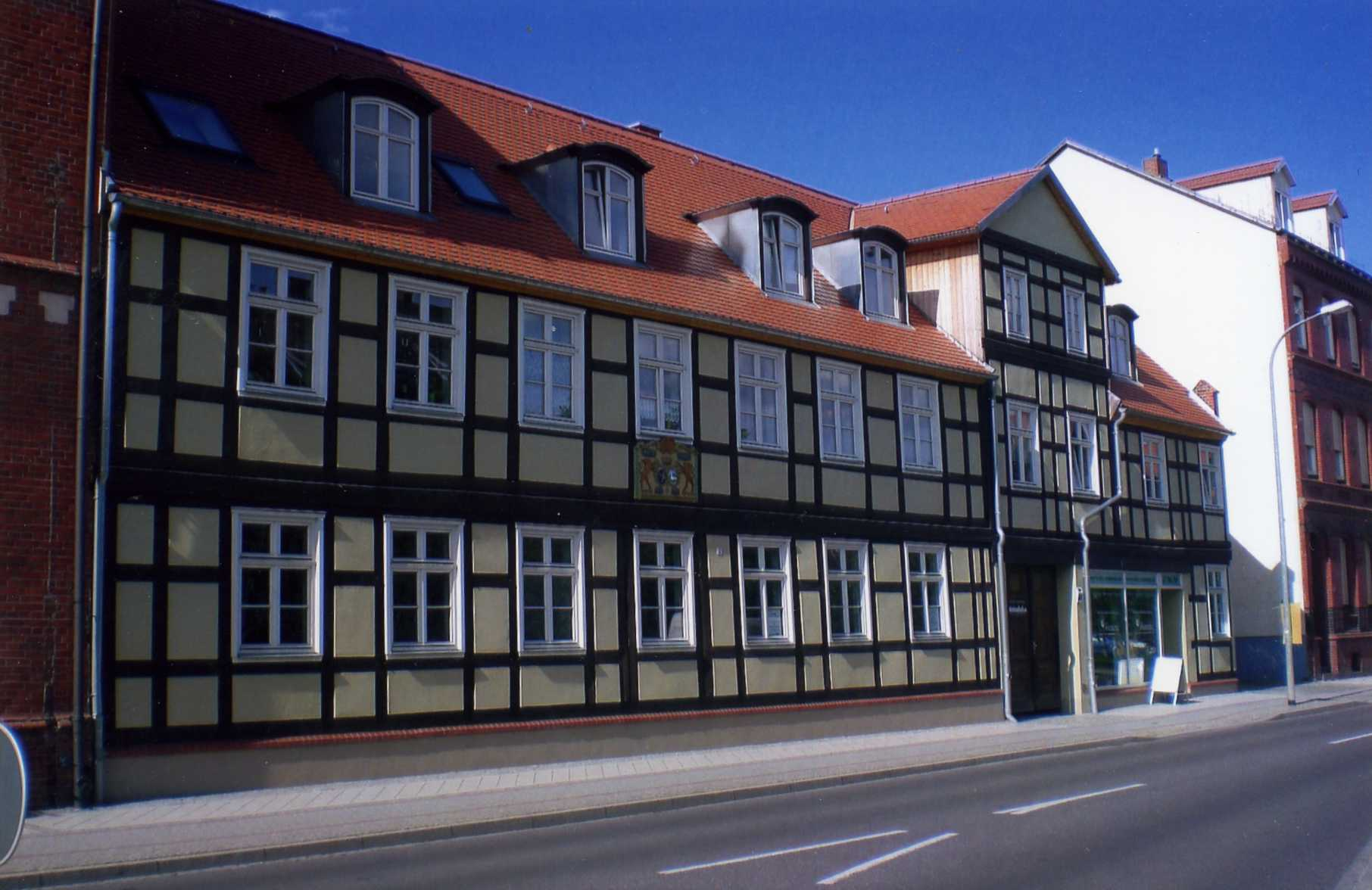 Freihaus des Generals du Moulin der in Stendal wohnte und starb. Die Adresse ist: Altes Dorf 32a. Das Haus steht unter Denkmalschutz.